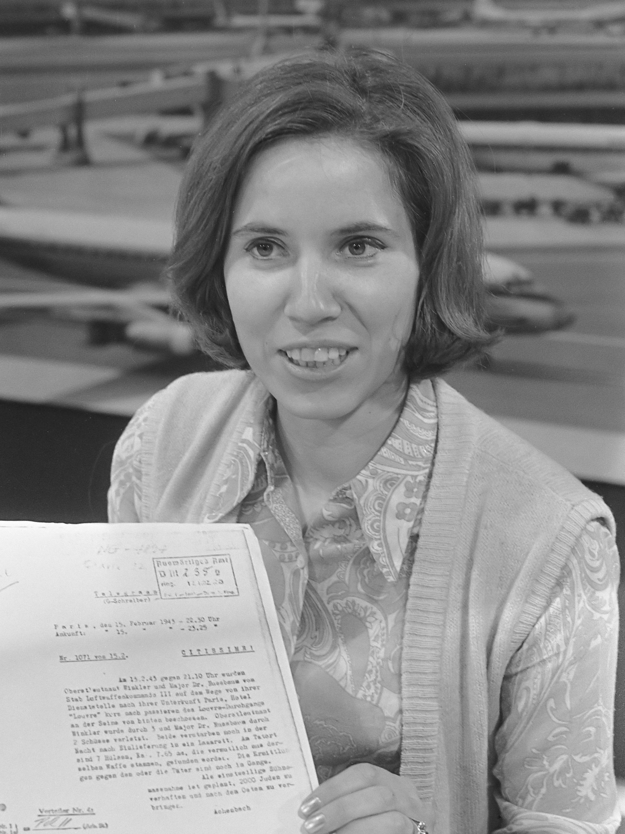 Journaliste Beate Klarsfeld (West-Duitsland) op Schiphol met beschuldigingen tegen Ernst Achenbach . Beate Klarsfeld met document 7 april 1970